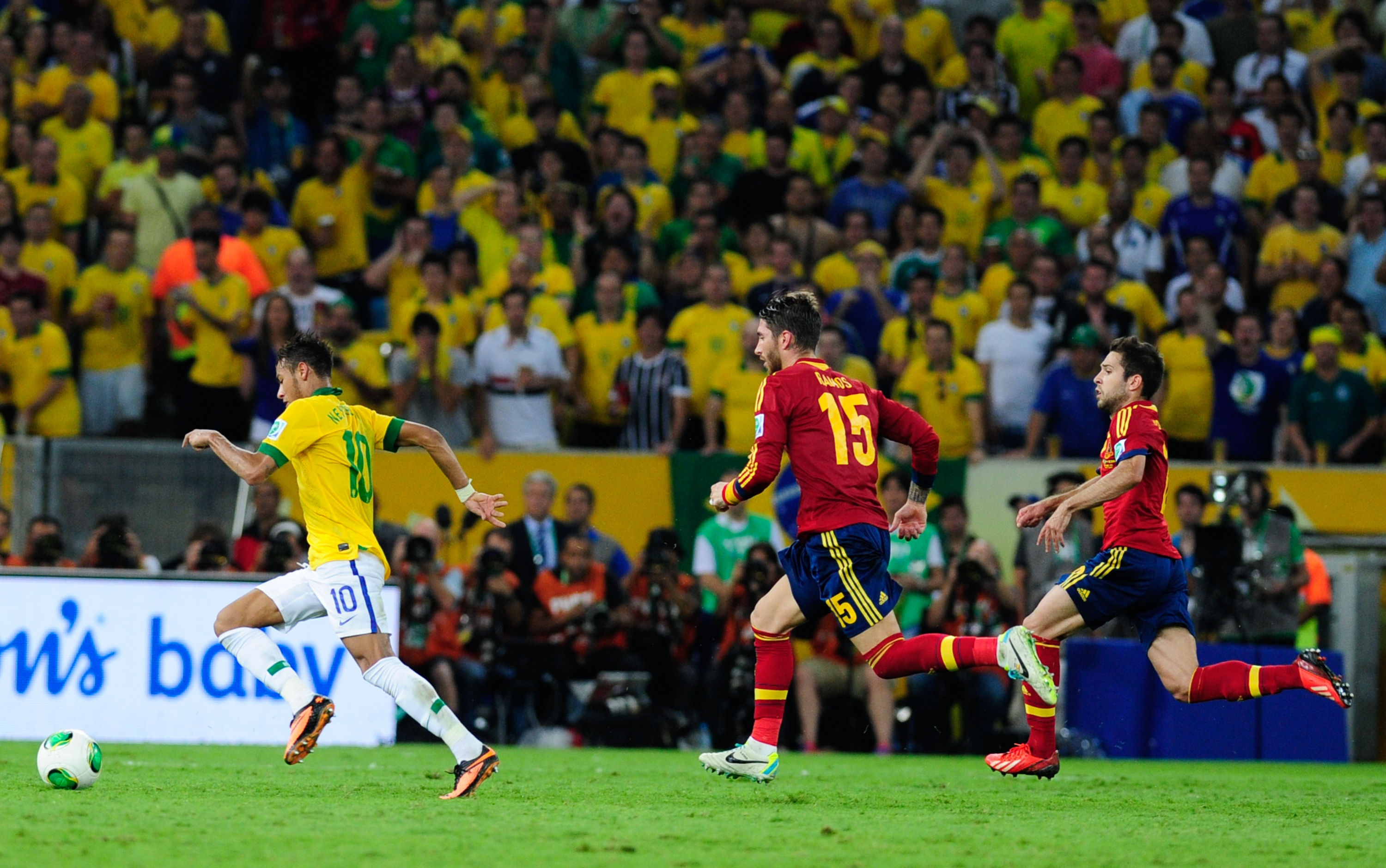 No Estádio do Maracanã, Brasil e Espanha disputam a taça da Copa das Confederações de 2013.